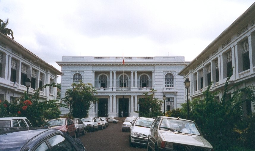 FC Georgio Préfecture de Fort de France (1997) Toute reproduction de cette photographie doit mentionner le nom de son auteur.